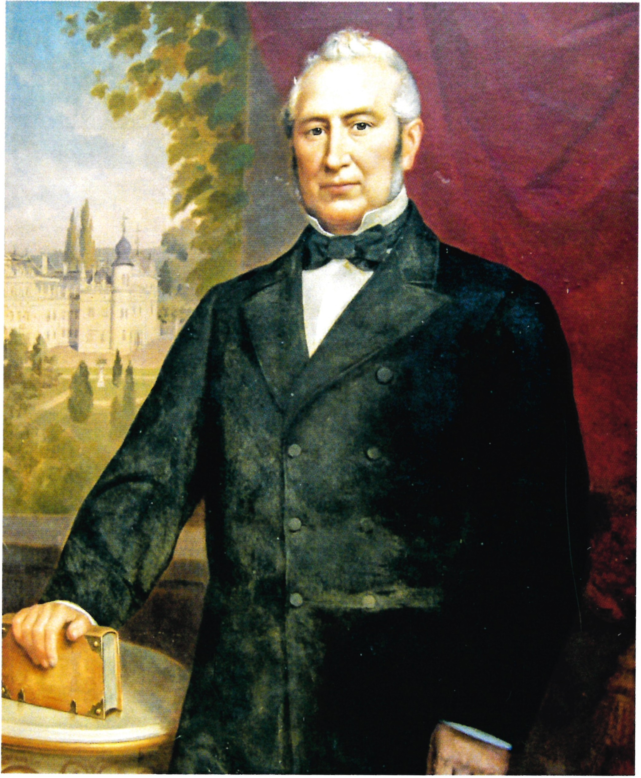 (Carl) Oskar Deuster (1835-1904), 1883, im Hintergrund Schloss und Park Ditterswind, Gemälde von August Noack